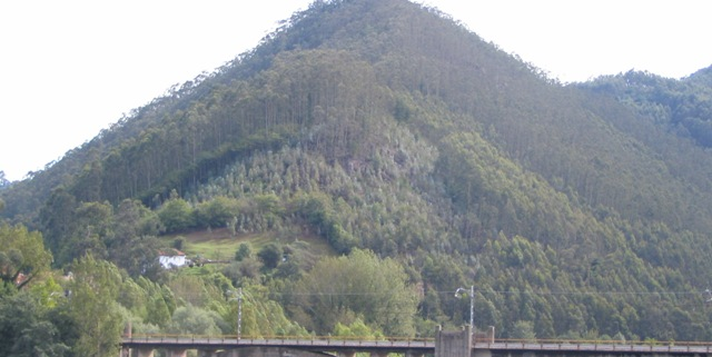 Template:Pico andolinas